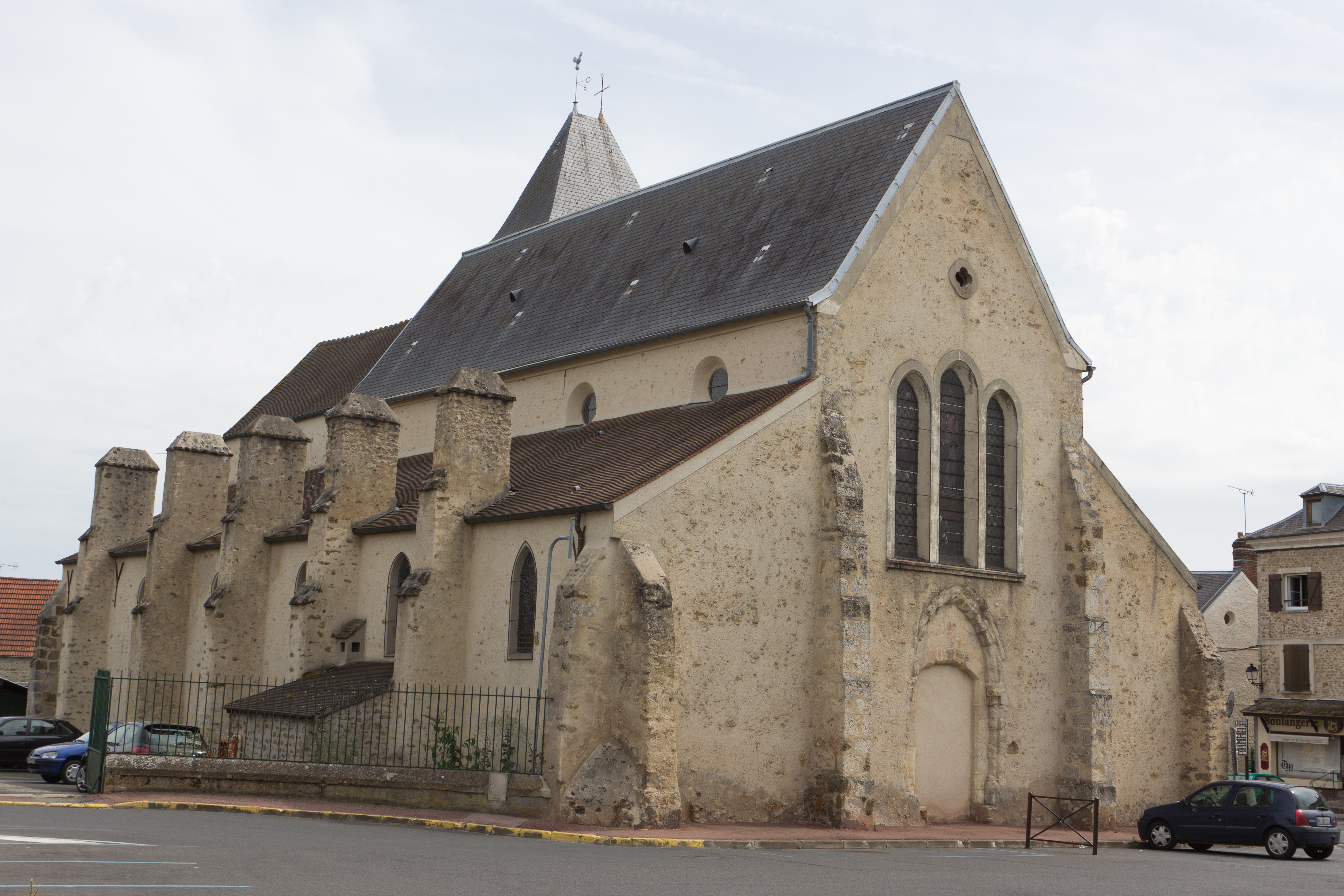 Eglise de Saint-Vrain, commune de Saint-Vrain, département de l'Essonne. France.